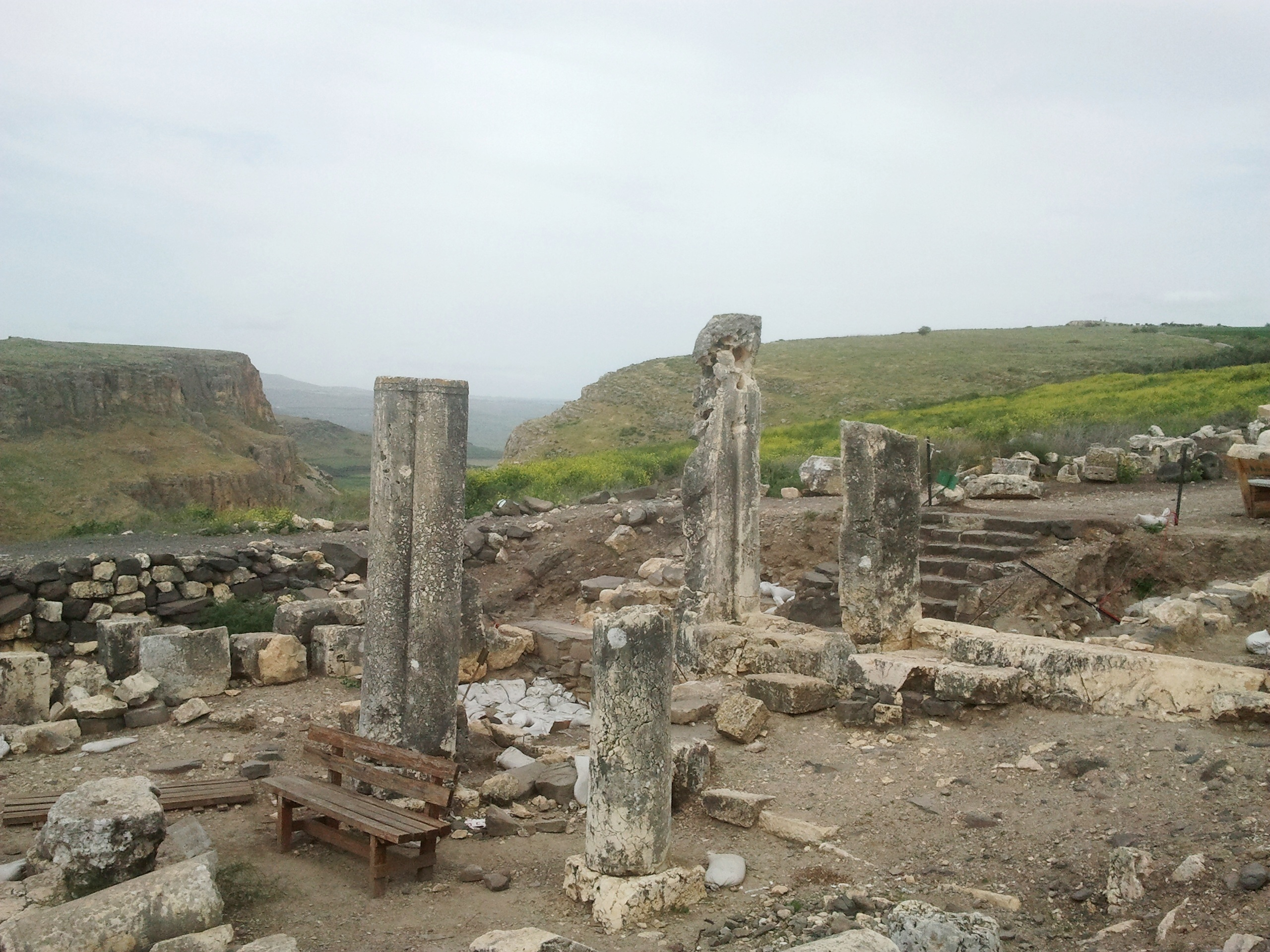 ארבל היה יישוב יהודי קדום מתקופת המשנה והתלמוד השוכן על הר ארבל- שרידי בית הכנסת העתיק